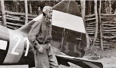 Horthy István, (1904 – 1942) magyar pilóta